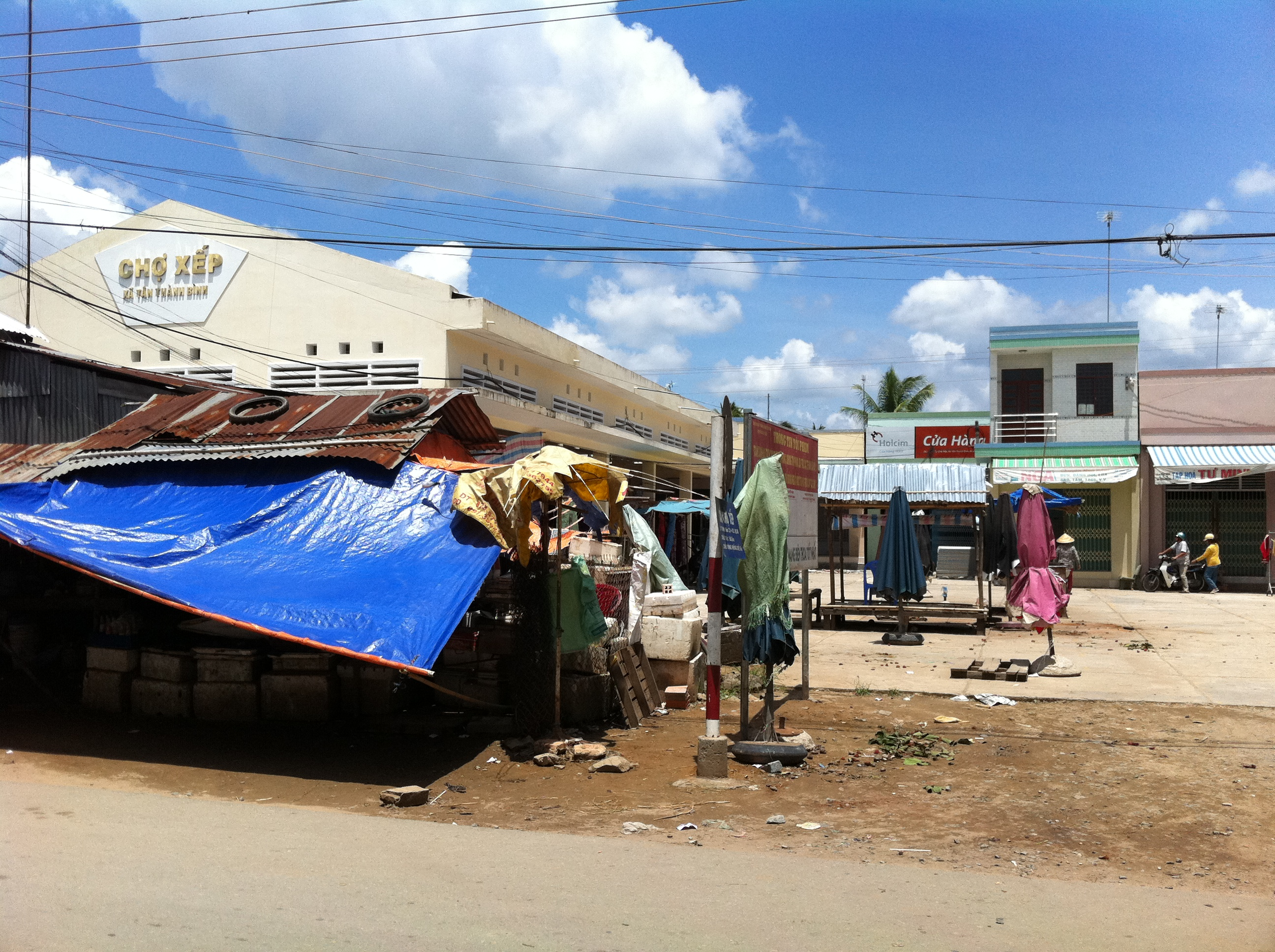 Chợ Xếp mới, xã Tân Thành Bình, Mỏ Cày Bắc, Bến Tre